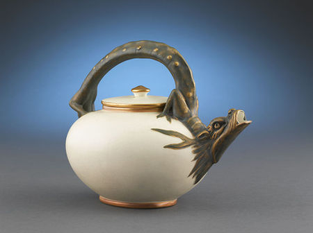 Théière Wedgwood XIXe